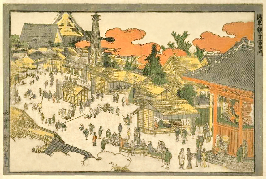 収載資料名 (PublicationName) ： 浮繪 (Uki-e) 出版社 (Publisher) ： 西村屋 (Nishimura-ya)